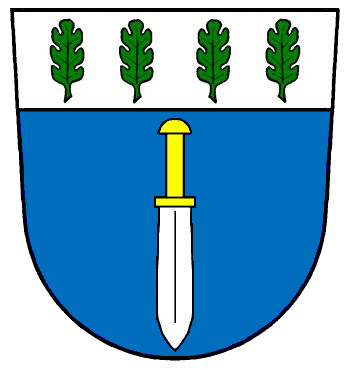 Coat of arms of Eschringen in Saarbrücken